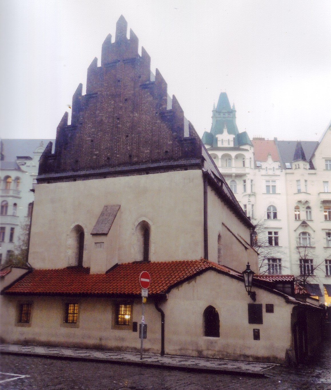 La Sinagoga Vecchionuova di Josefov a Praga